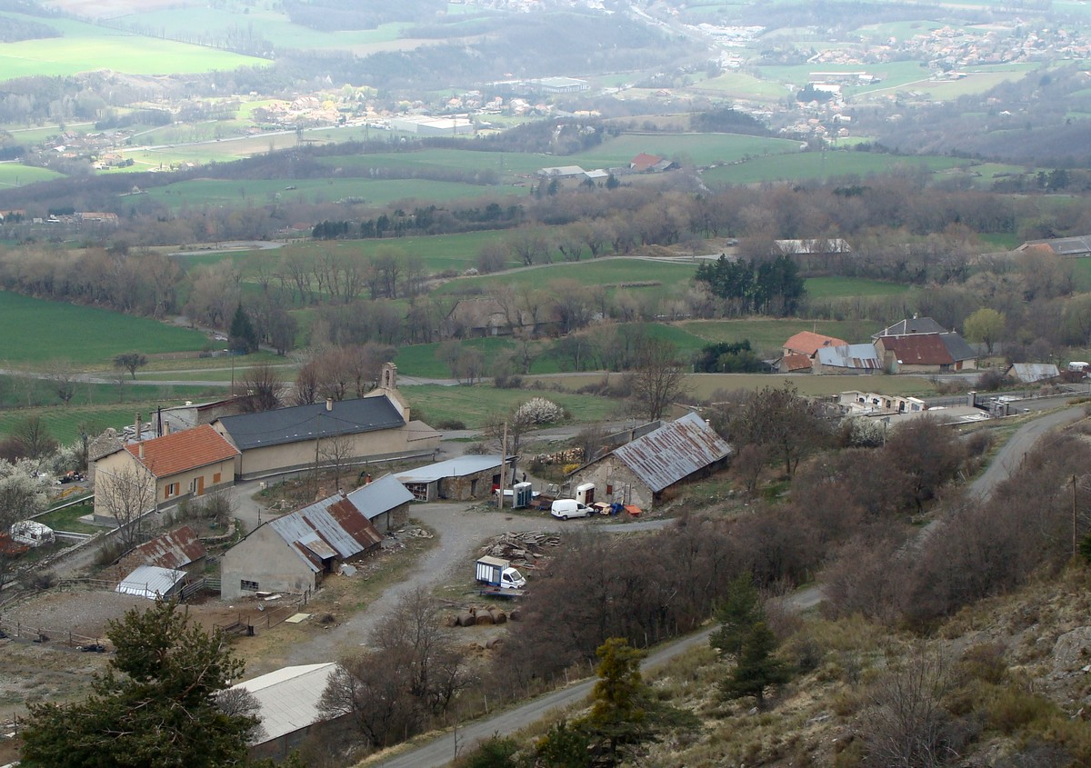 La Rochette (Hautes-Alpes), vue générale : au premier plan, l'Eglise et les Férauds ; au fond à gauche, Pont-Sarrazin, sur la route nationale.